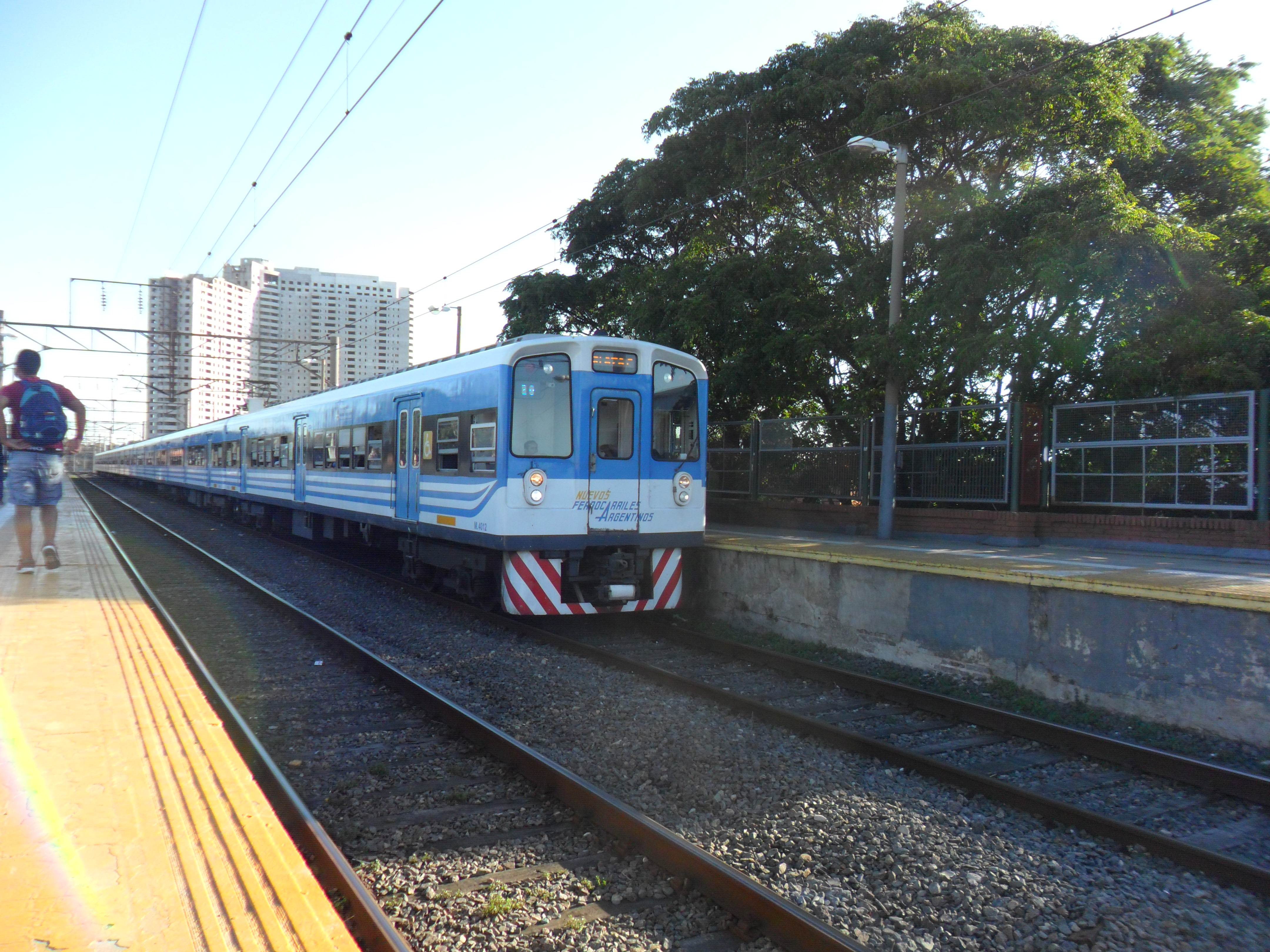 Tren eléctrico Toshiba arribando a Avellaneda.